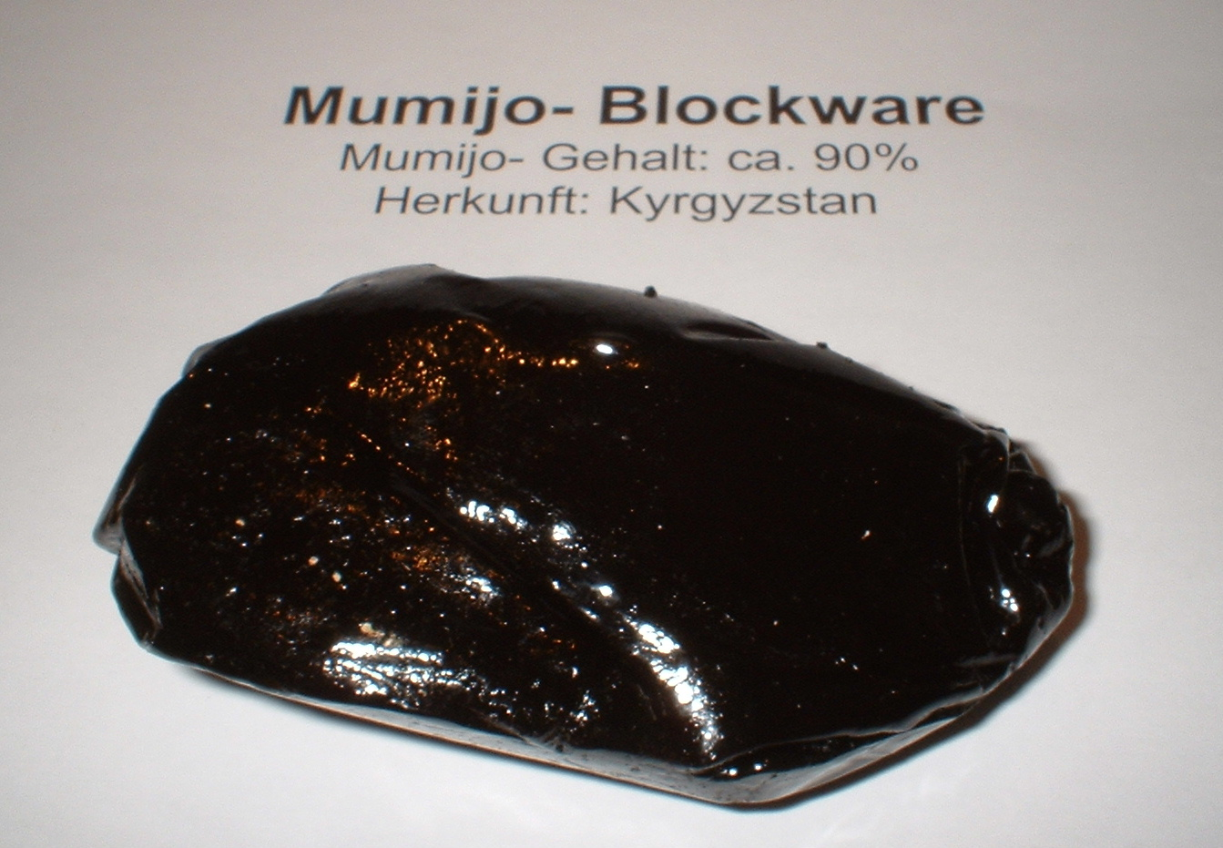 Gereinigte Mumijo- Substanz, Gehalt ca. 90% Reinstoff